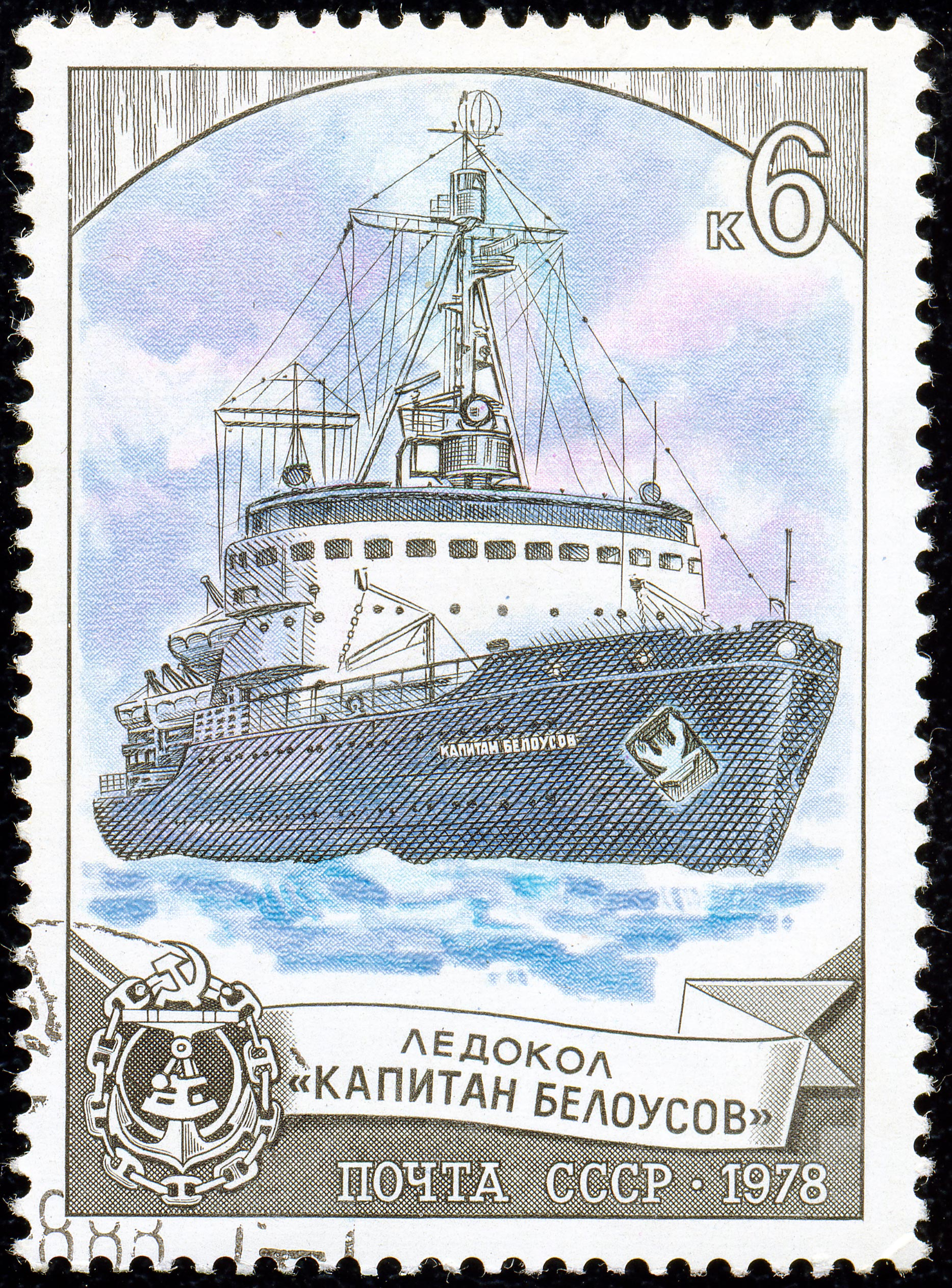 Почтовая марка СССР. 1978. Ледокол Капитан Белоусов